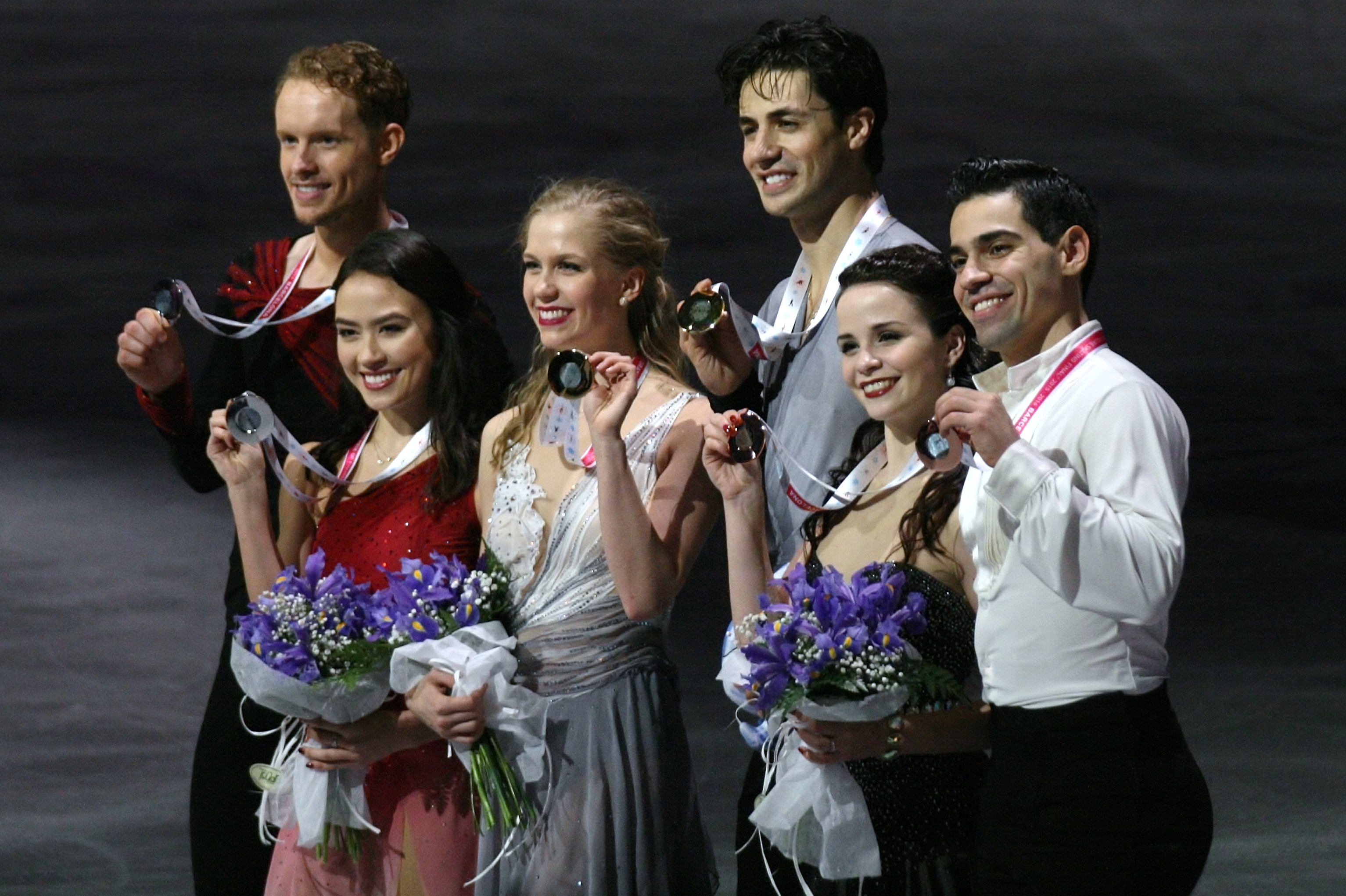 Церемония награждения в танцах на льду на финале Гран-при по фигурному катанию 2015-2016. Слева на право: Мэдисон Чок и Эван Бейтс (США) - 2е место, Кэйтлин Уивер и Эндрю Поже (Канада) - 1е место, Анна Каппелини и Лука Ланотте (Италия) - 3е место.